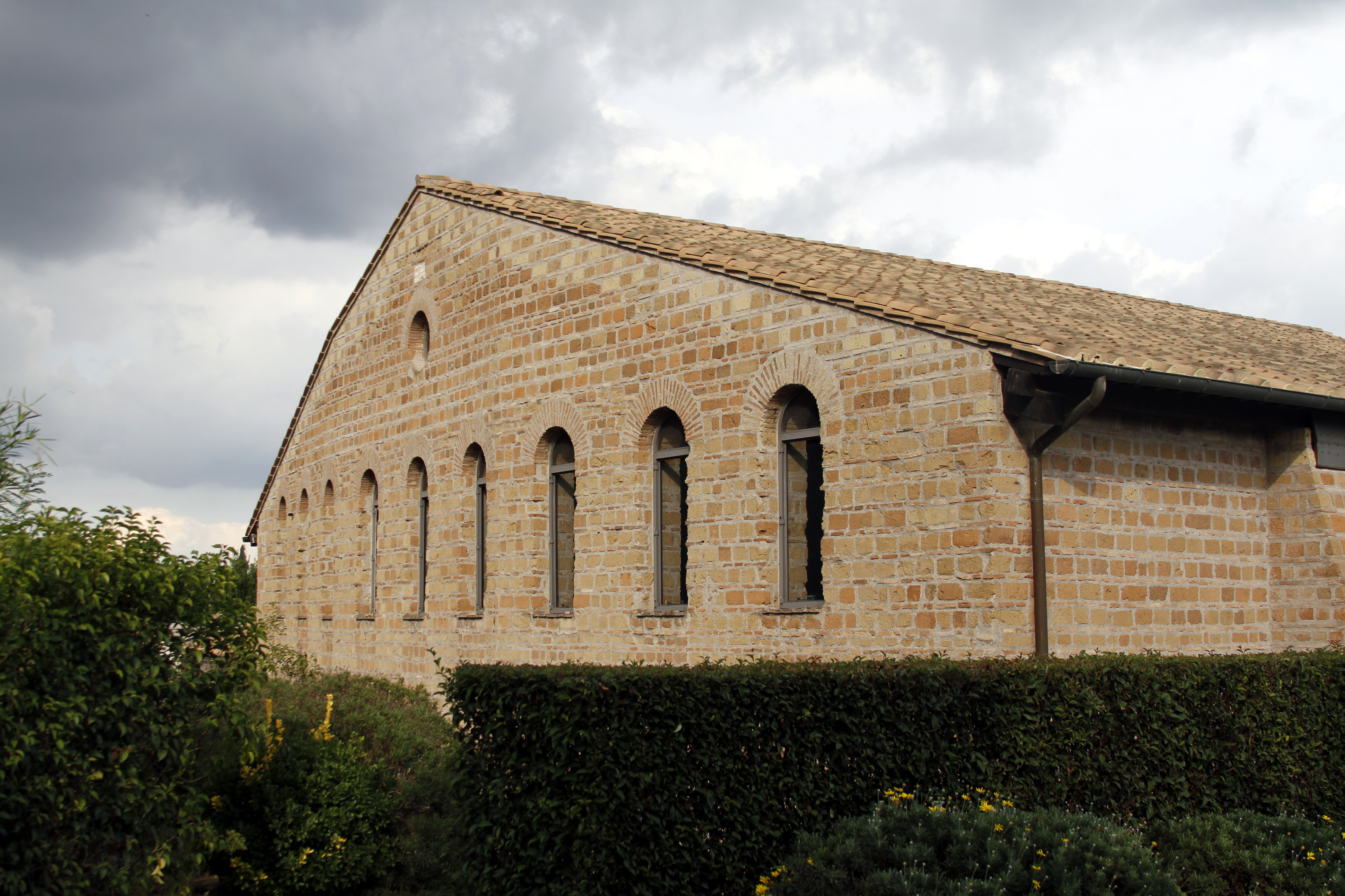 Catacombs of Domitila - Rome